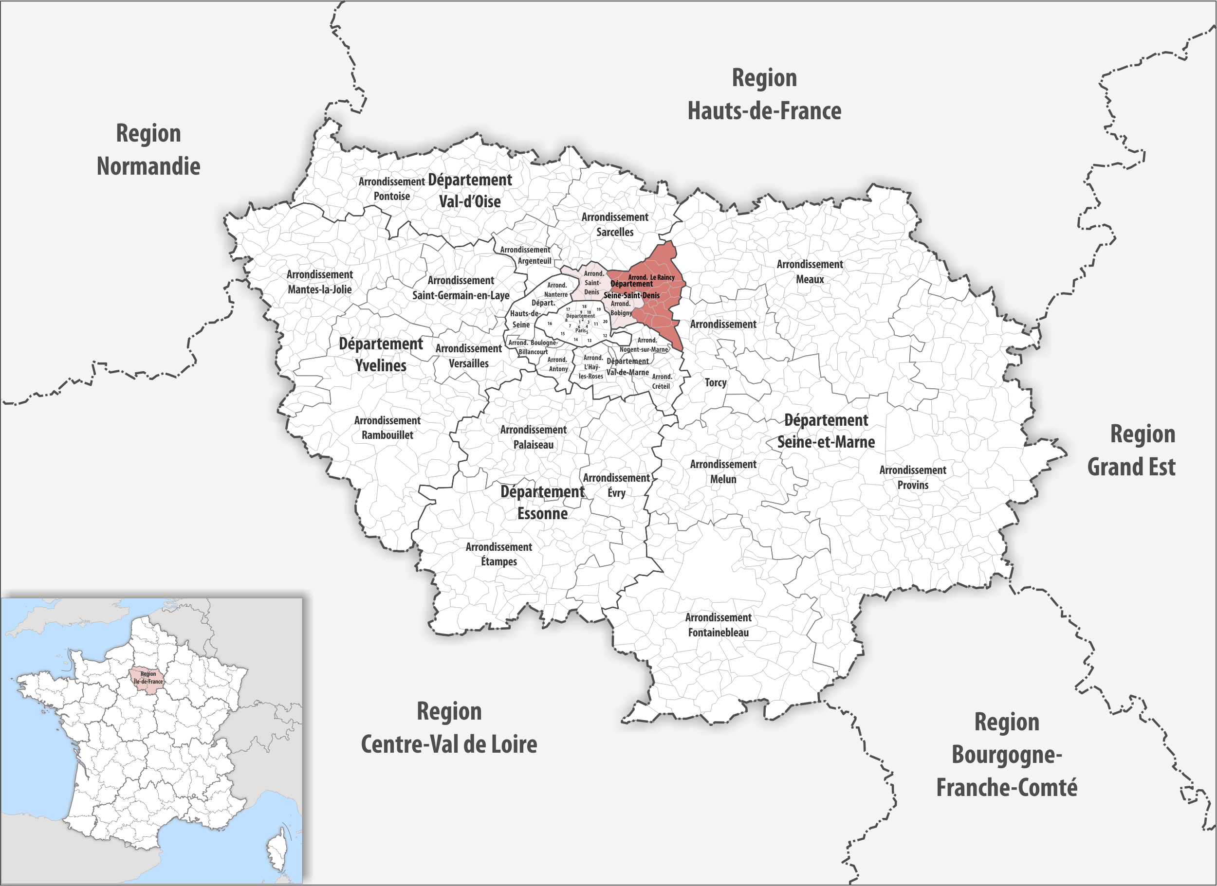 Lage des Arrondissements Le Raincy